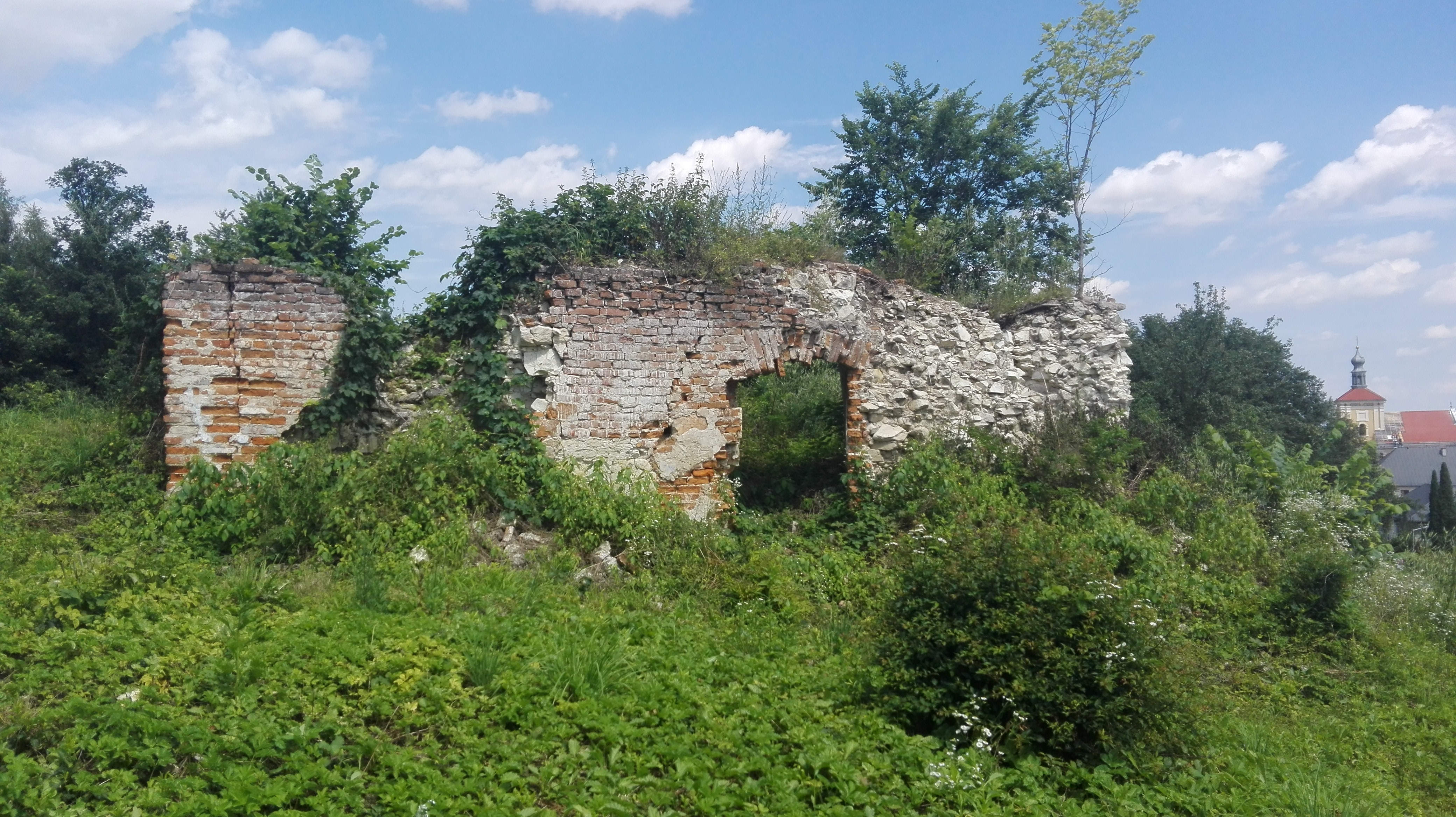 Ruiny wieży zamkowej z 2 połowy XIV wieku, przebudowanej w XVI wieku.